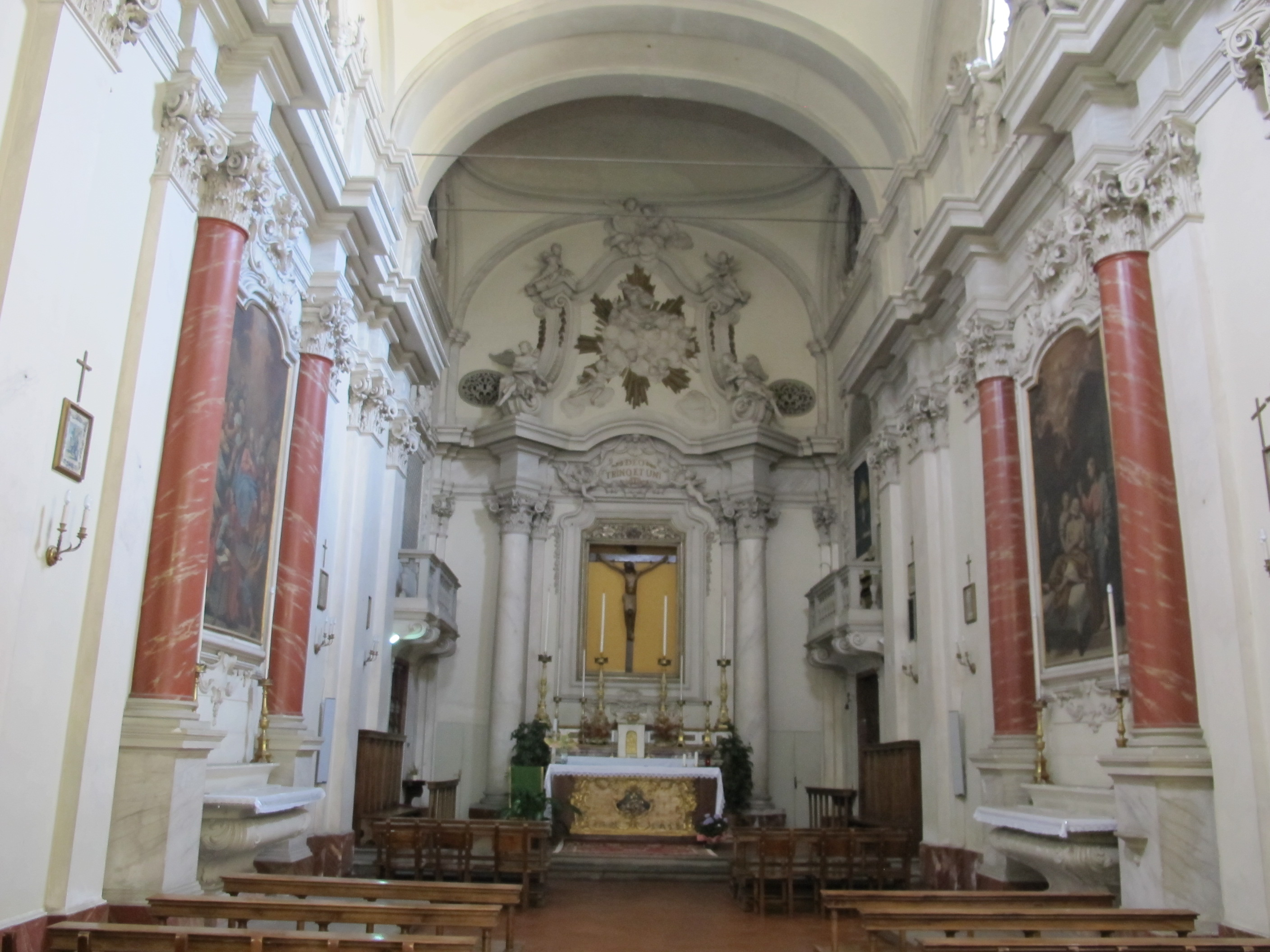 Arezzo, ss. trinità